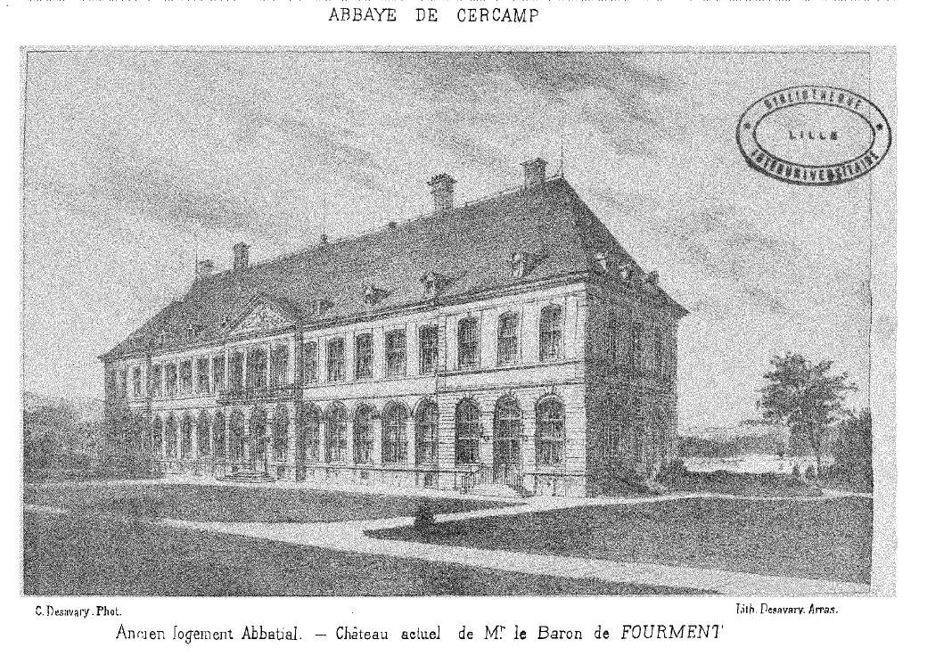 Abbaye de Cercamps - ancien logement abbatial - 1878